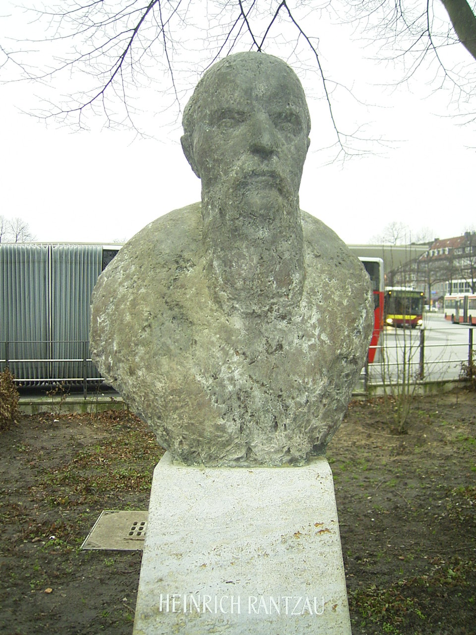 Büste Heinrich Rantzaus am Markt in Wandsbek